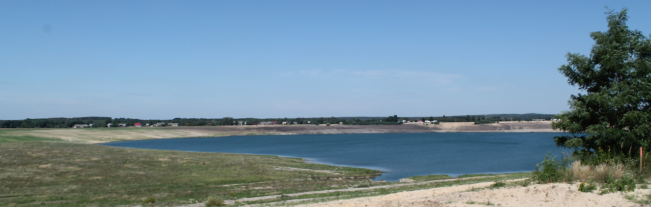 Jezioro, w tle Milinów (część wschodnia wsi)